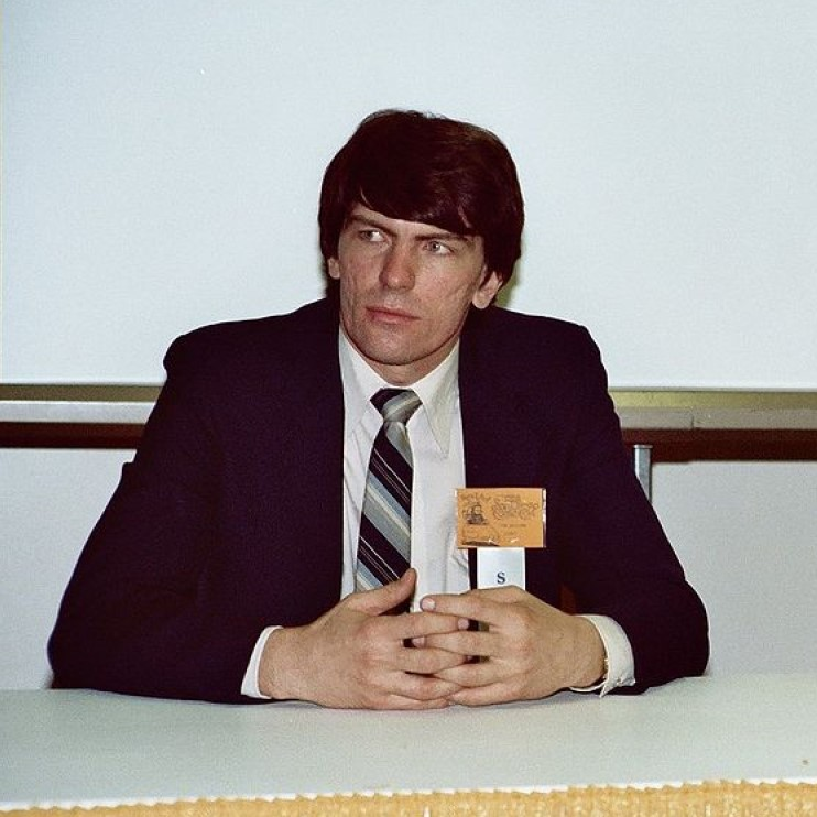 Jim Shooter assis derrière une table lors d'une conférence dans une convention de comics en 1982.